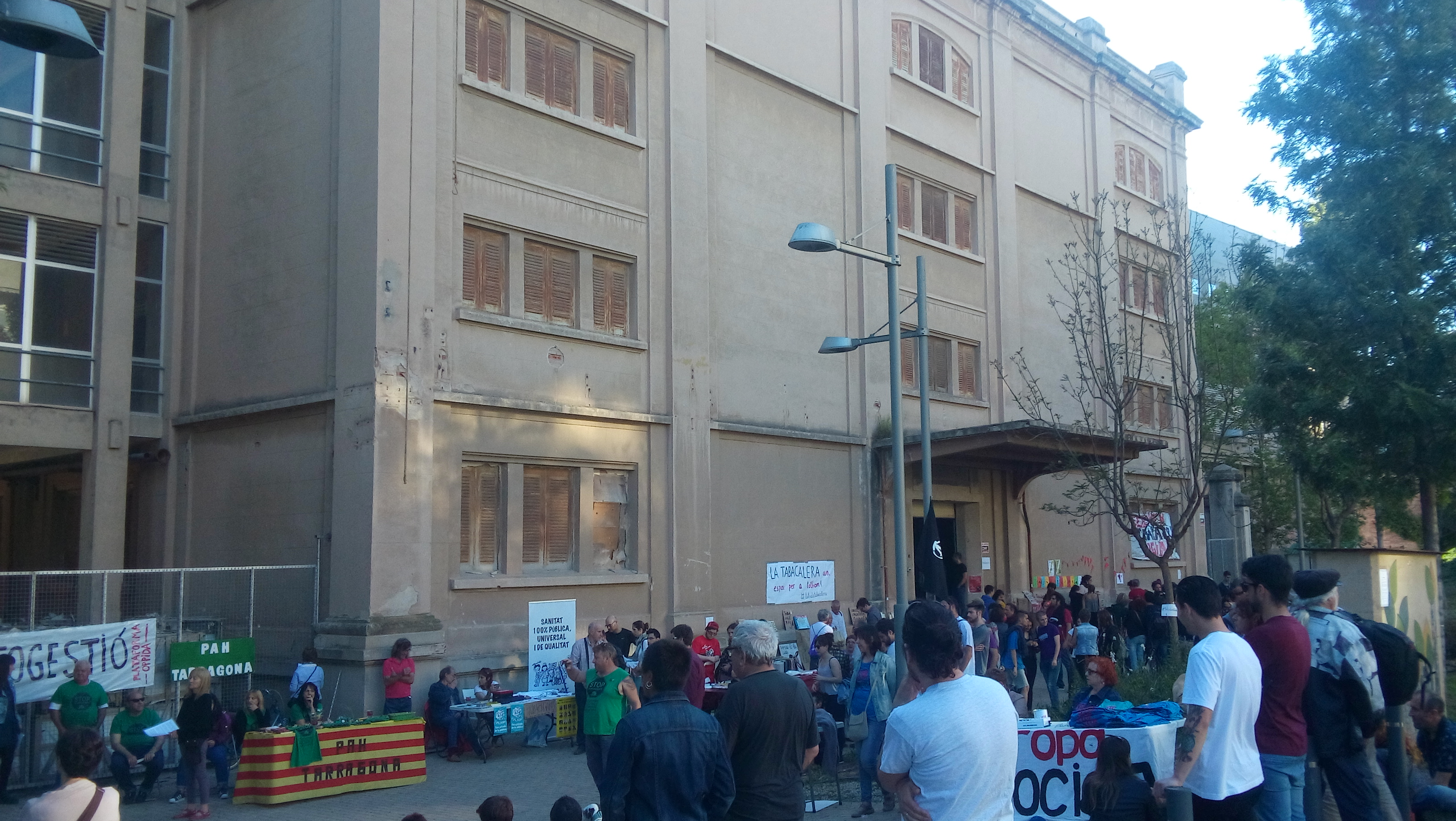 Ocupació simbòlica d'un edifici del complex per denunciar el seu abandonament.